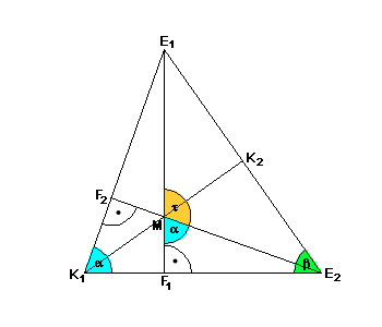 Tetraeder Aufriss